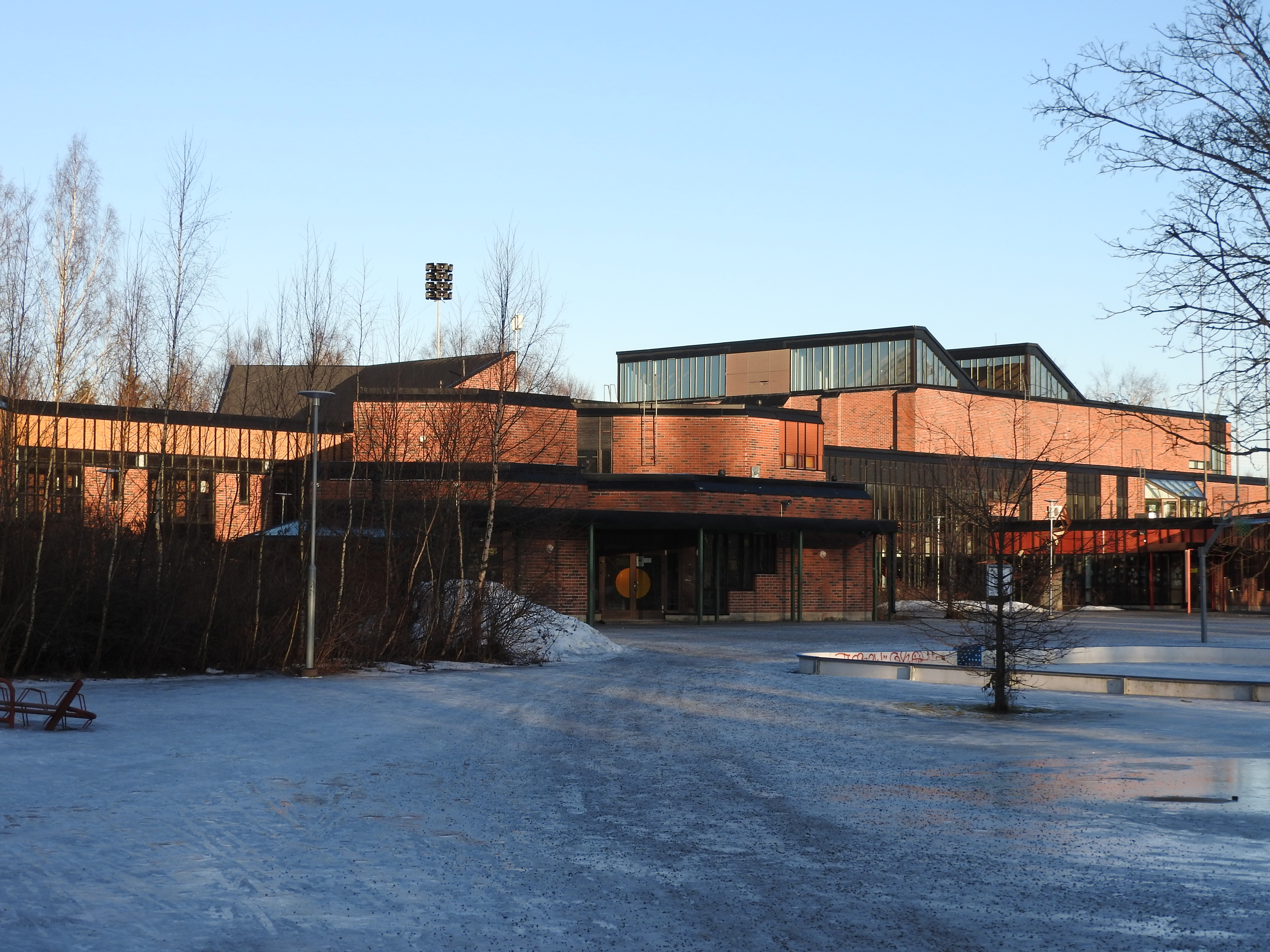 Variskan koulu talvella 2017.